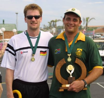 Reinhard Plog and Gerrie Craig after Int'l Masters 2004